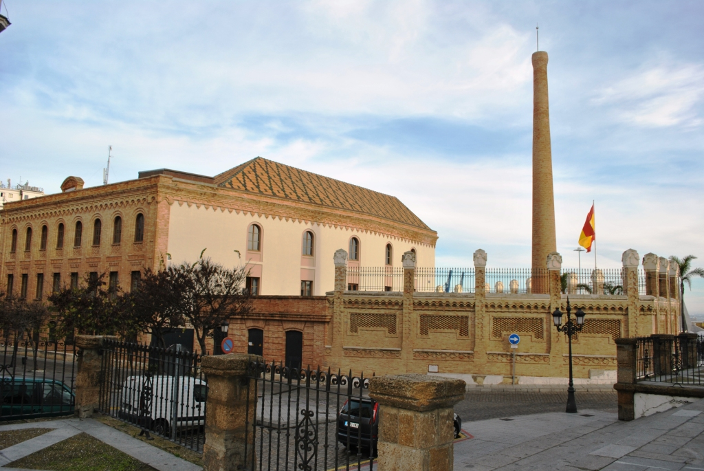 Cádiz